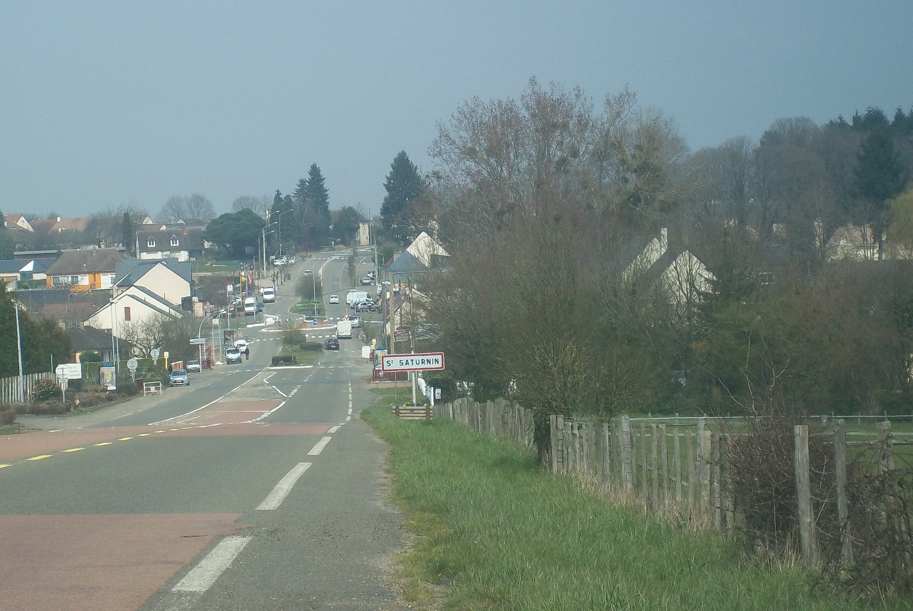 Saint Saturnin - entrée sud